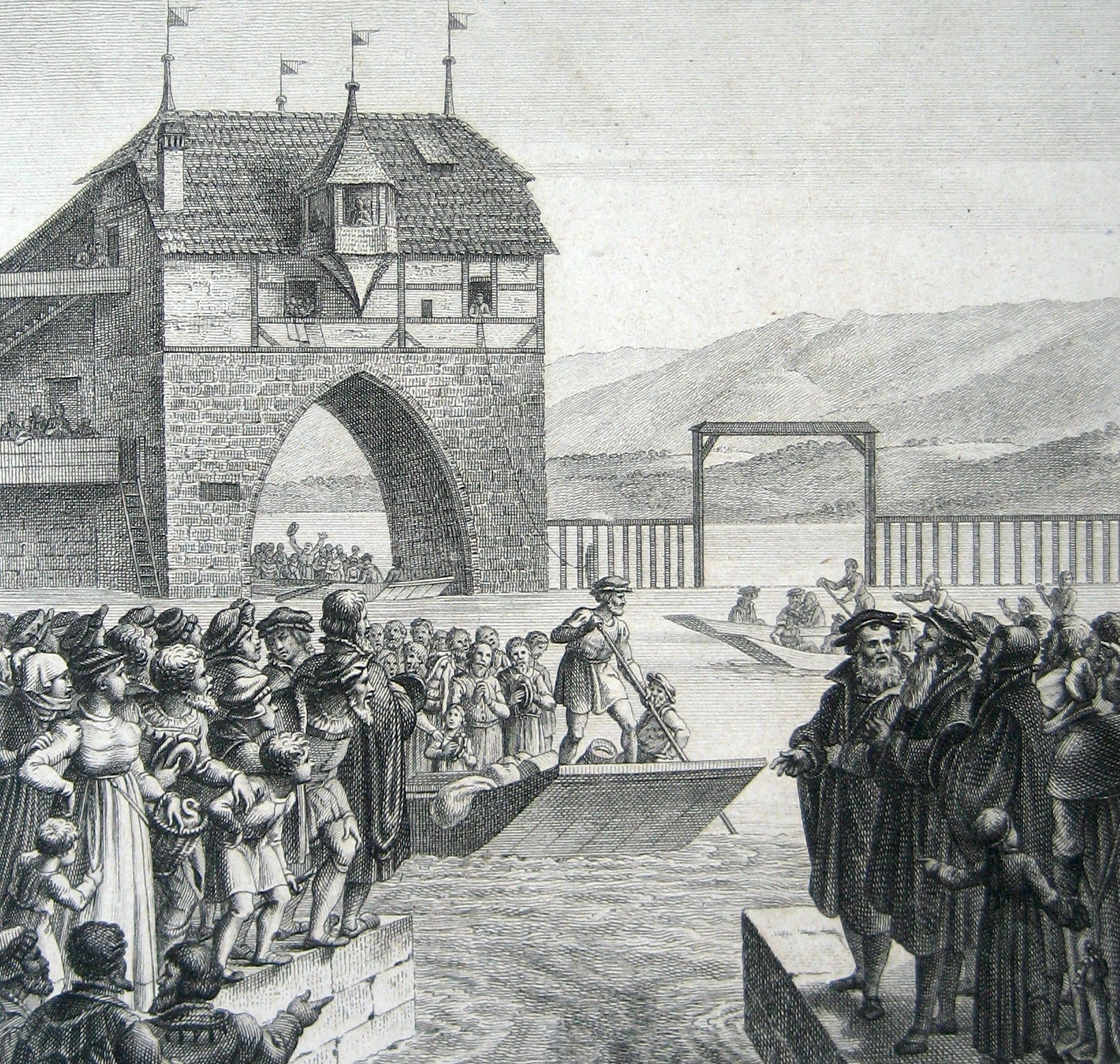 Ankunft der reformierten Flüchtlinge aus dem Tessin in Zürich am 12. Mai 1555. Im Hintergrund Schifflände mit Grendeltor, Stich von M. Usteri